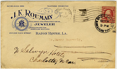 Postkarte aus Baton Rouge nach Chicaco, dort am 8 Oktober 1910 durch die Western Tube in Chicago wegen Nachsendung nach Charlotte in North Carolina zum Abgangspostamt befördert. Der entsprechende Stempel aus Chicago dokumentiert diese Behandlung der Sendung.